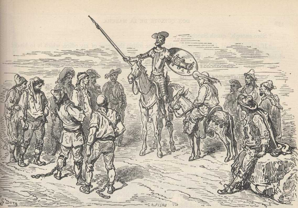 Dom Quixote liberta os condenados